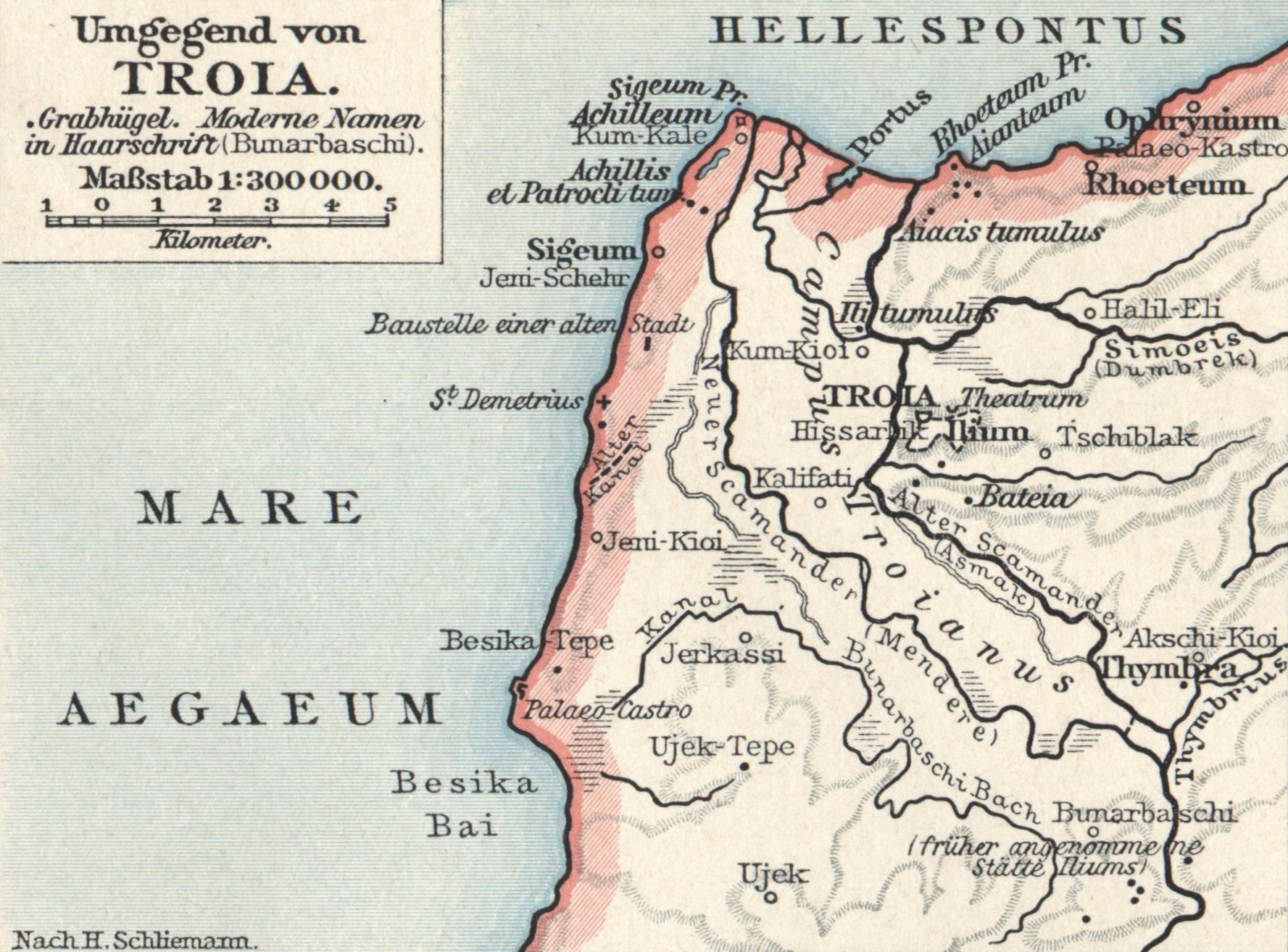 Umgegend von Troia nach Heinrich Schliemann.